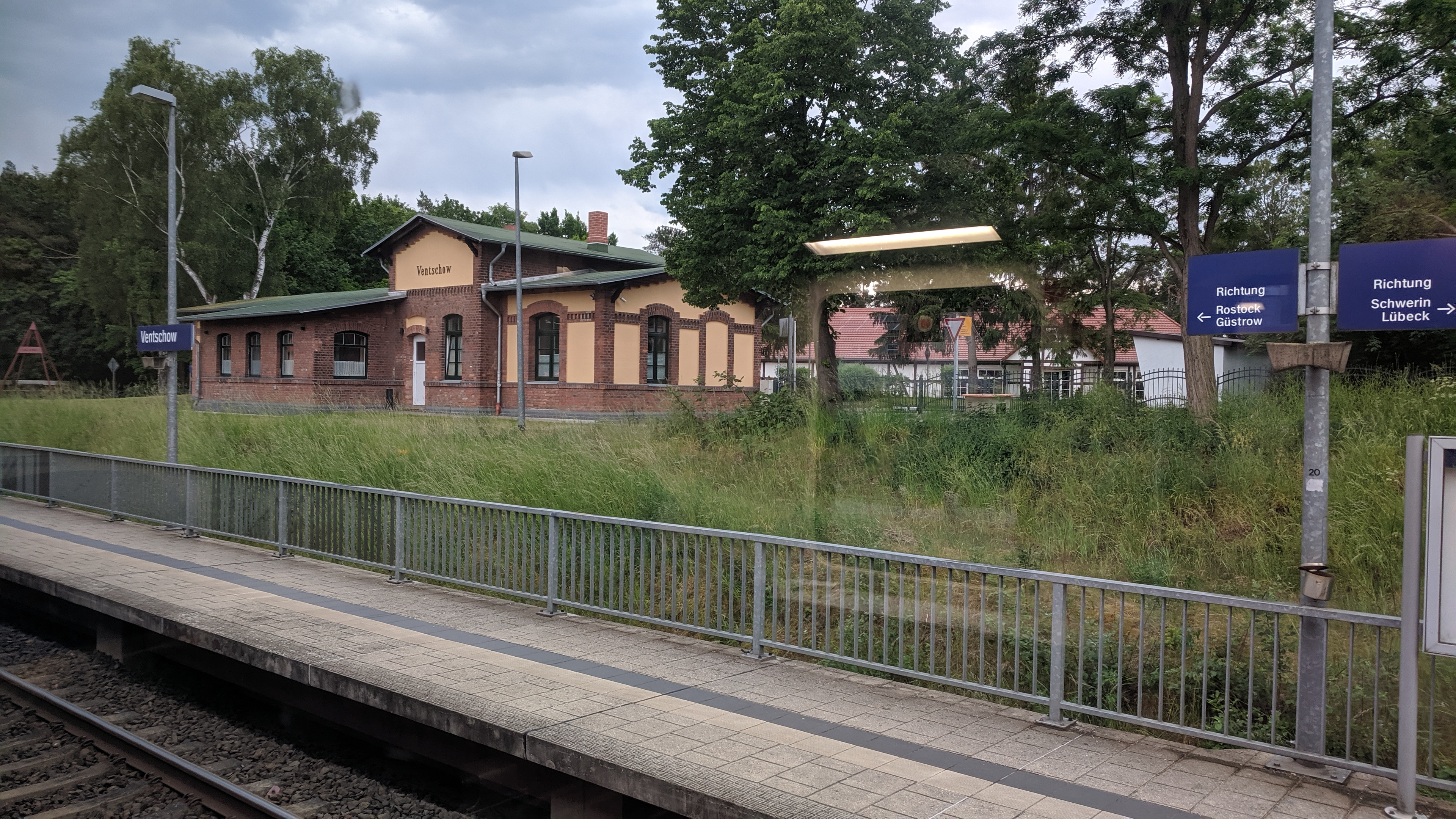 Bahnhof Ventschow, Taken on 3 June 2019